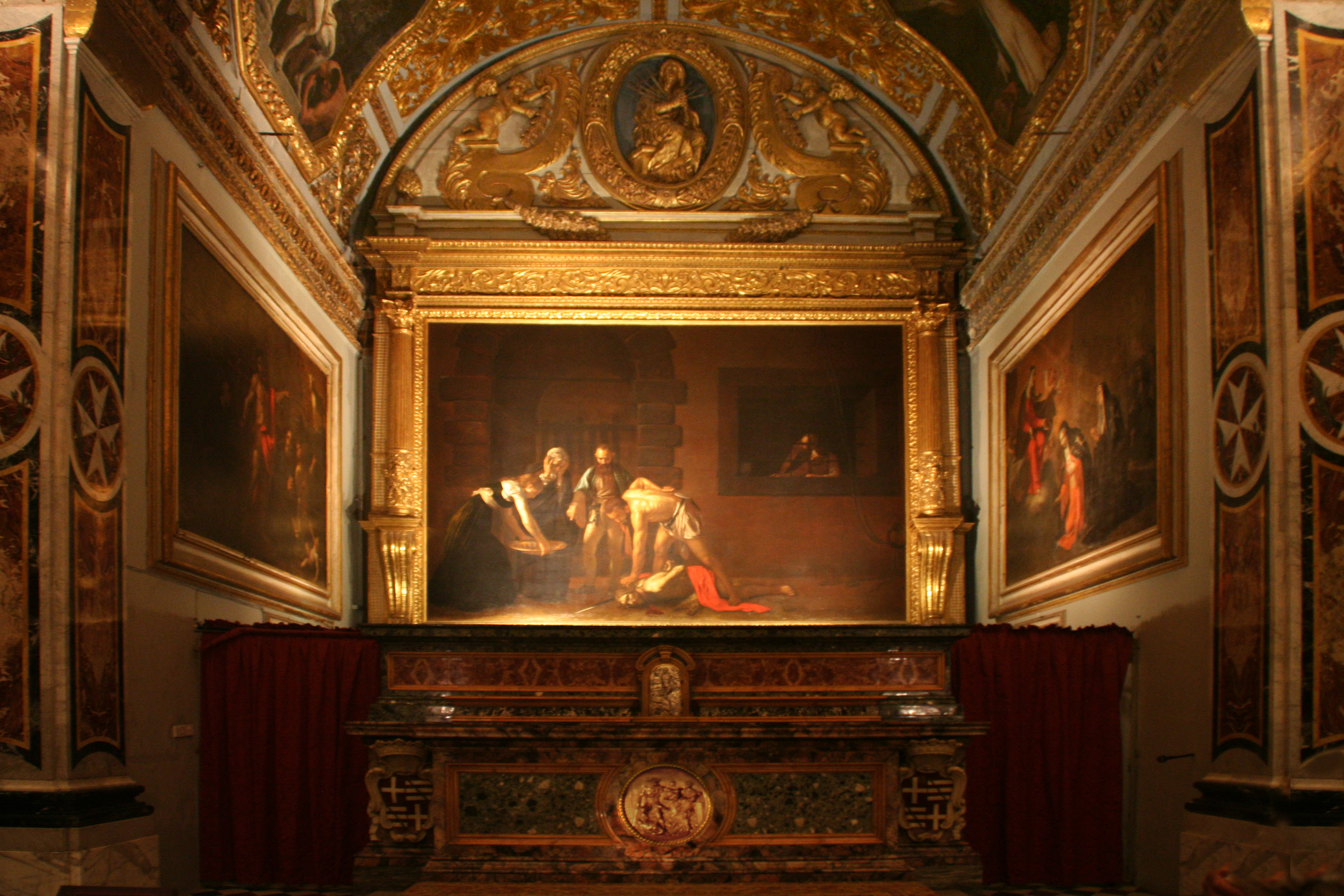 oratoire de la co-cathédrale Saint-Jean de La Valette avec la décolation de saint Jean-Baptiste du Caravage